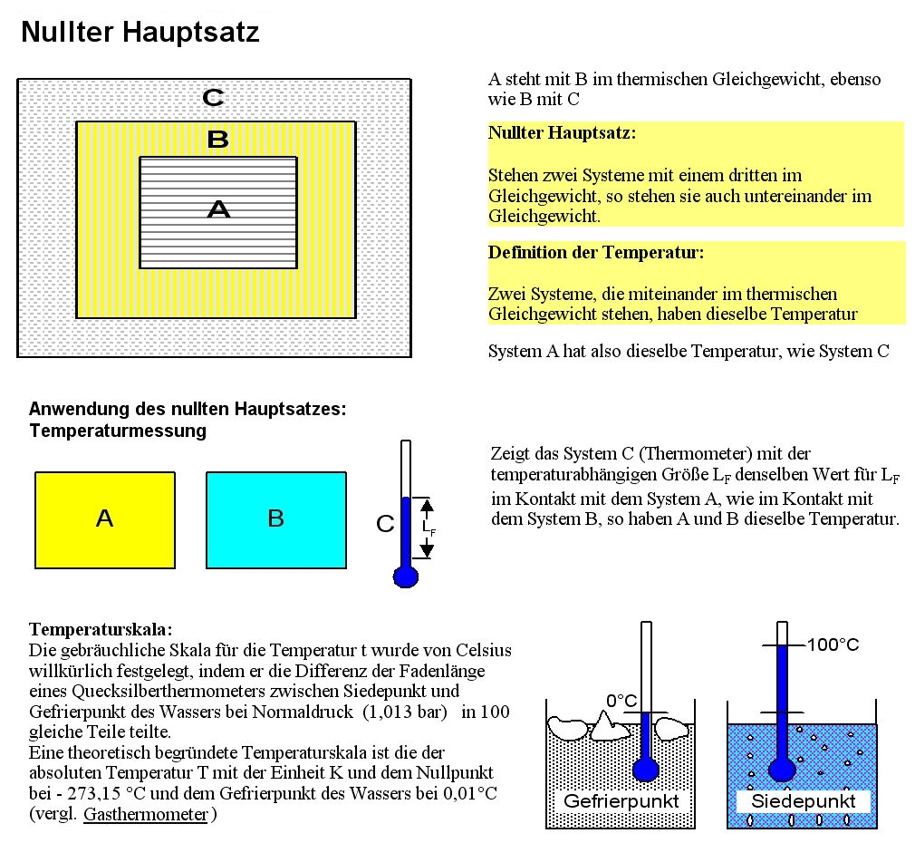 Nullter Hauptsatz